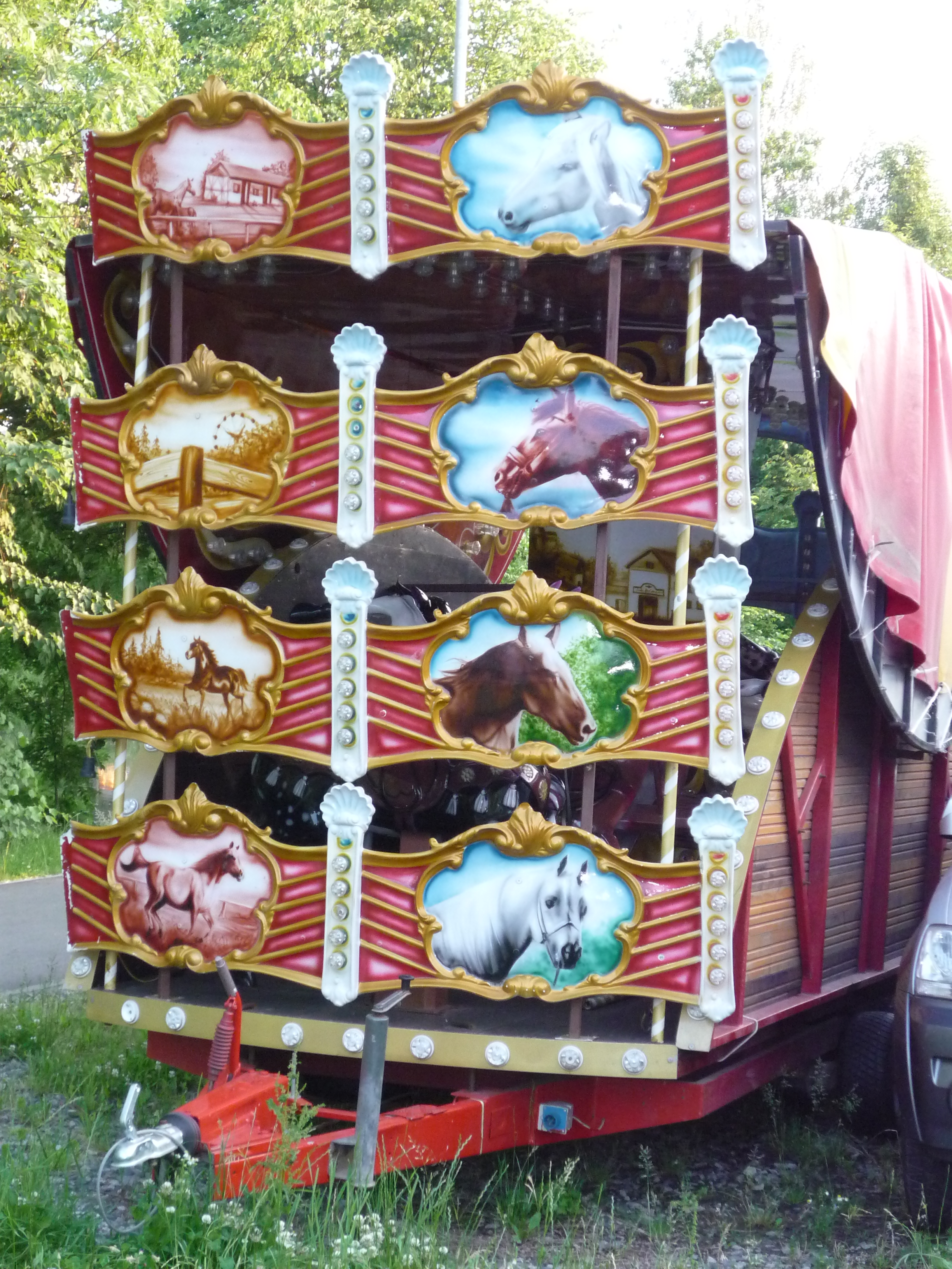 Autor fotografie Jiří Zelenka. Cirkus Berousek v Havlíčkově Brodě. Páteční večer. Plocha pro pouťové atrakce. Vjezd z ulice Masarykova naproti Bille.Na volnou plochu u Fotbalového stadionu. Město Havlíčkův Brod. Kraj Vysočina.Czech Republik.